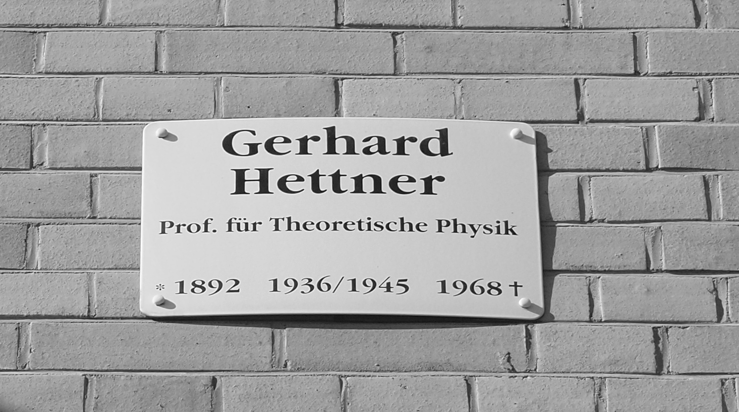 Gedenktafel für den Physiker Gerhard Hettner (1892-1968) in Jena, Helmholtzweg 5